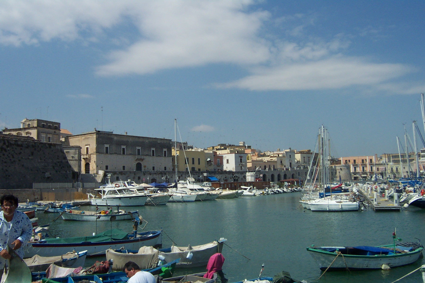 Porto di Bisceglie con il Palazzo Ammazzalorsa